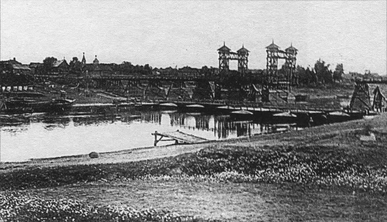 Беларуская (тарашкевіца): Менск (Miensk), Серабранскія Млыны (Sierabranskija Młyny) з боку ракі Сьвіслачы (Śvisłač)